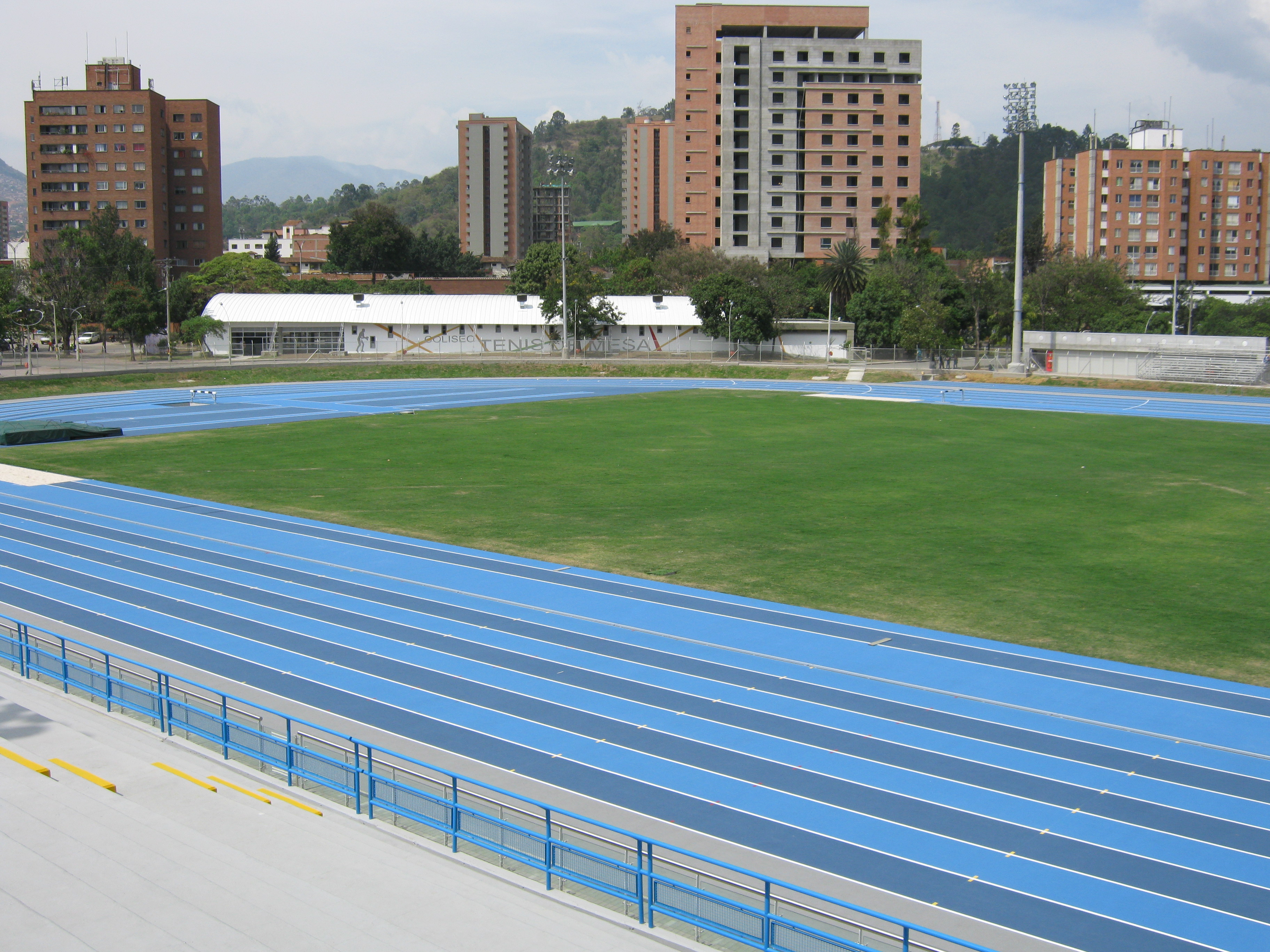 Estadio de Atletismo, en la Unidad Deportiva Atanasio Girardot. Medellín. Colombia.